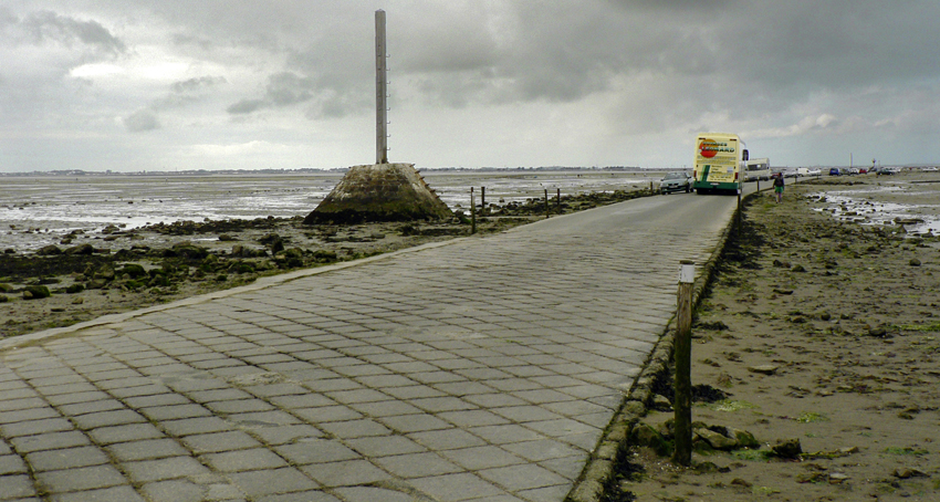 Ile de Noirmoutier (France), le passage du Gois